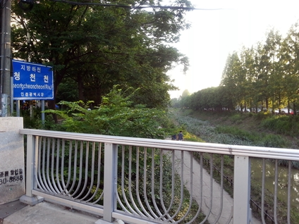 청천천. 서부1교 위에서 서쪽 방향.